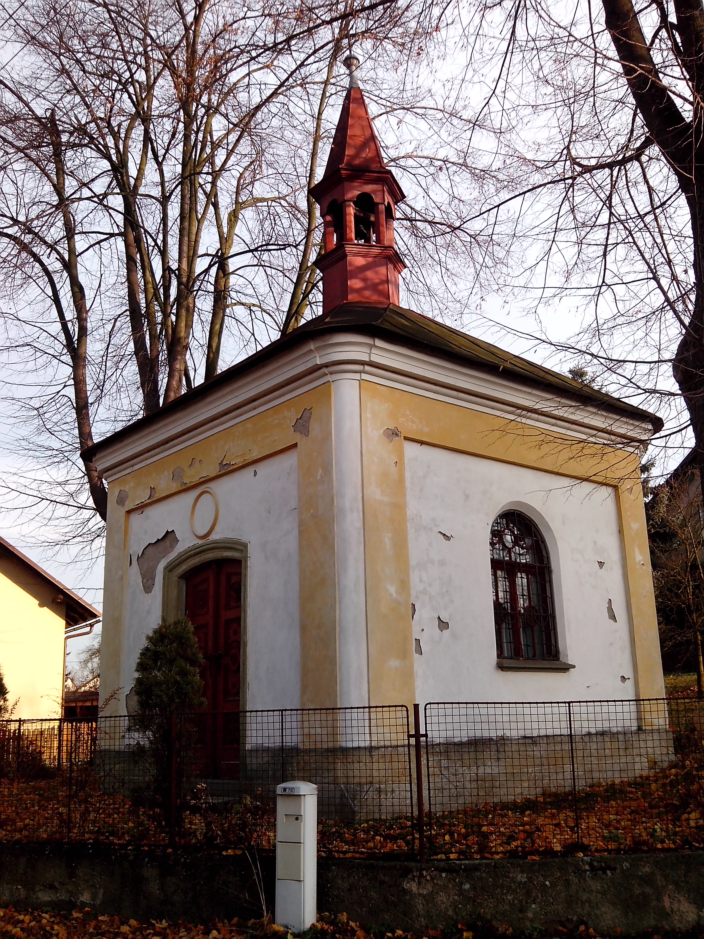 Kaple sv. Bartoloměje (Lipovka)